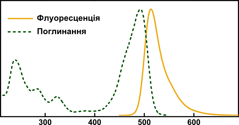 Спектри поглинання та флуоресценції флуоресцеїну